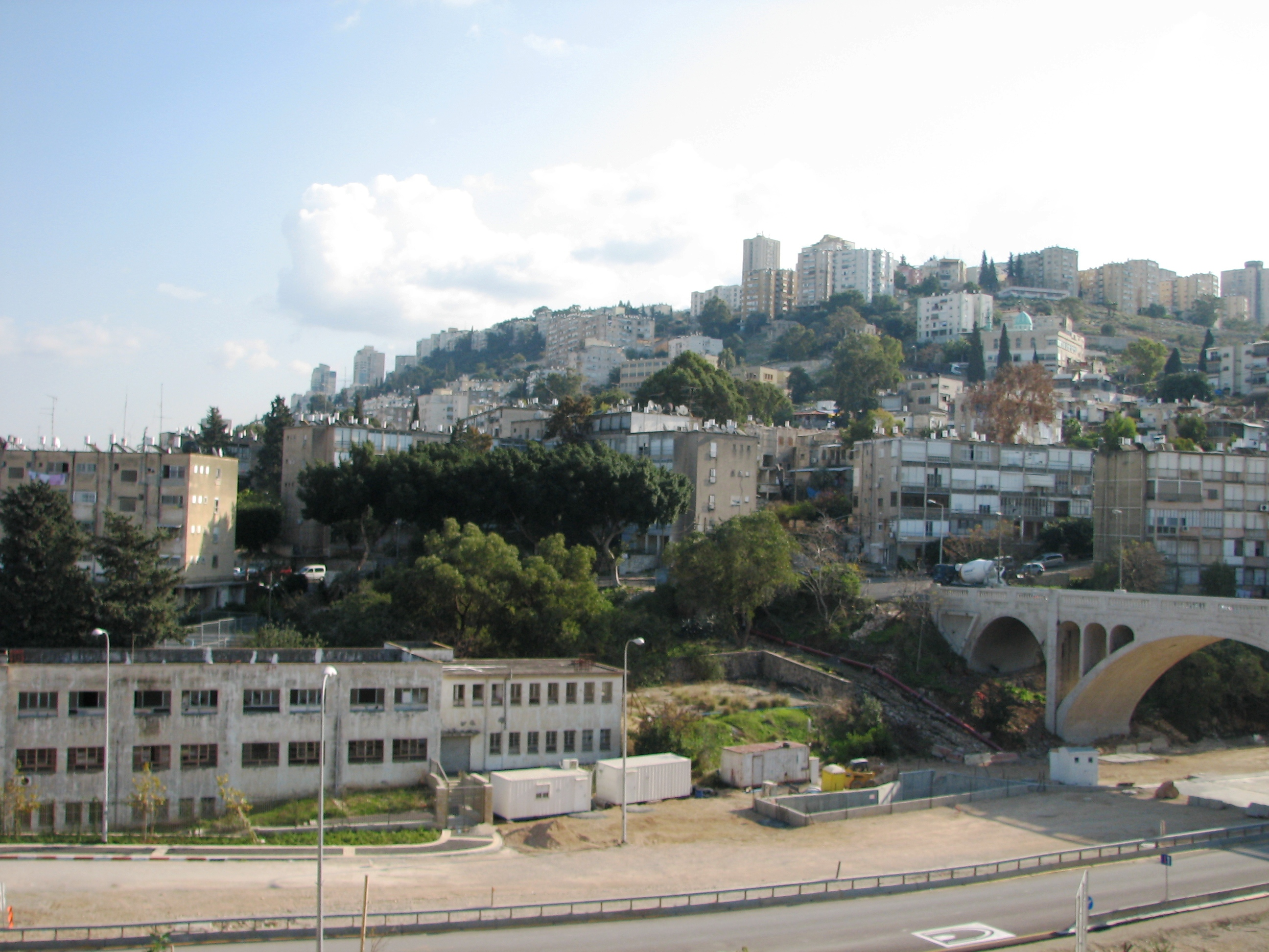 Rushmia bridge, Haifa, Israel גשר רושמיה בחיפה, מעל ואדי רושמיה. שכונת חליסה. בקרב על חיפה במלחמת העצמאות התחוללו קרבות כבדים על בית הנג'אדה בקרבתו. לאחר המלחמה הוחלף שמו לגשר הגיבורים ושם הואדי תחתיו - לנחל הגיבורים. בסמוך לגשר - אנדרטה ללוחמי גדוד 22 שנפלו במלחמת העצמאות ברקע משמאל שכונת חליסה